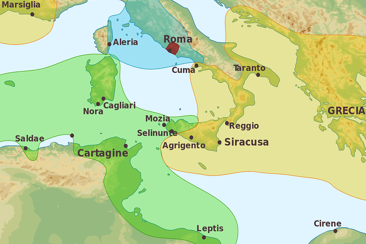 Il Mediterraneo occidentale al tempo del trattato romano-cartaginese del 509 a.C. Cartaginesi Etruschi Greci Romani